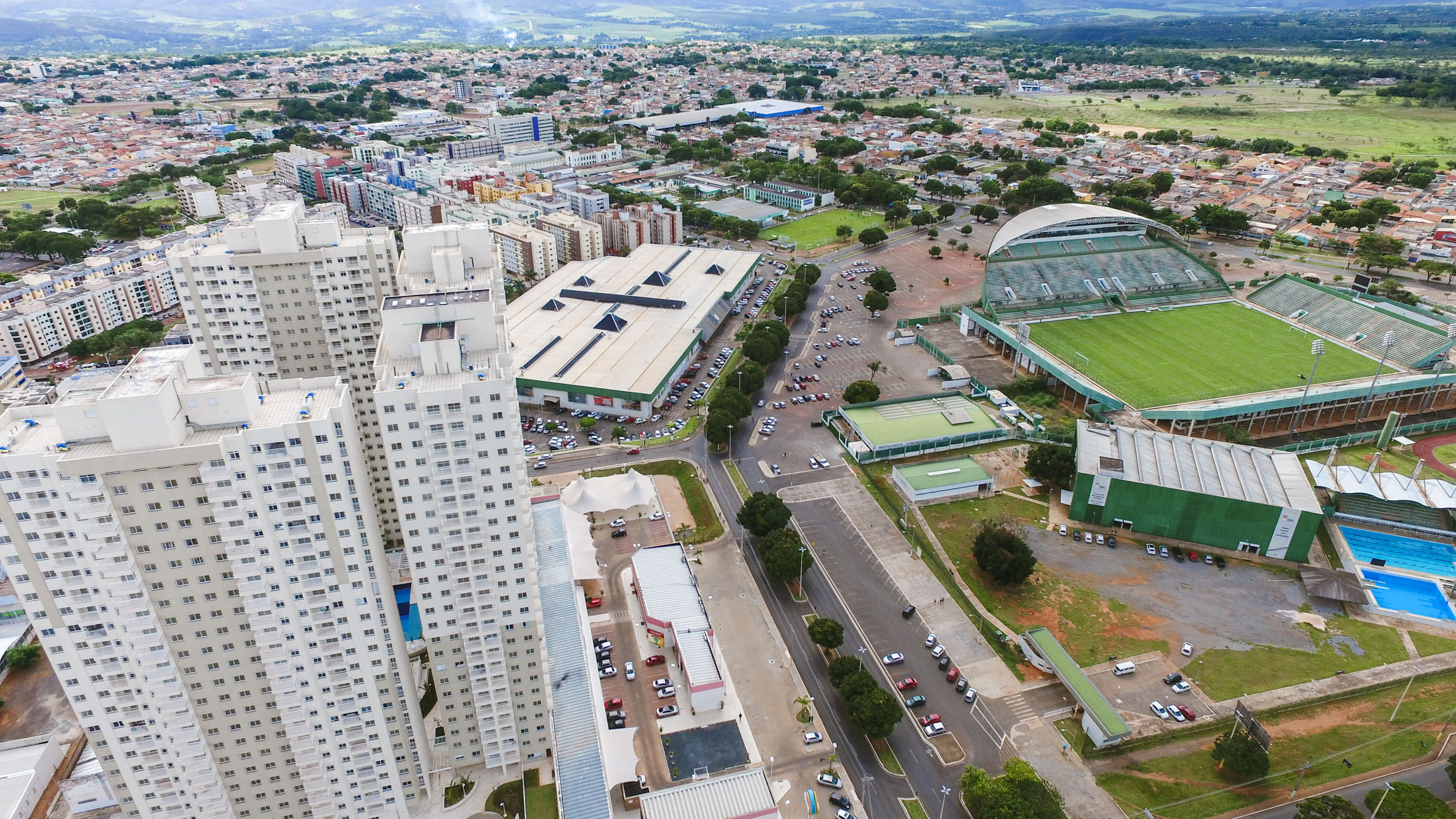 Vista do Estádio Bezerrão e o Shopping do Gama.